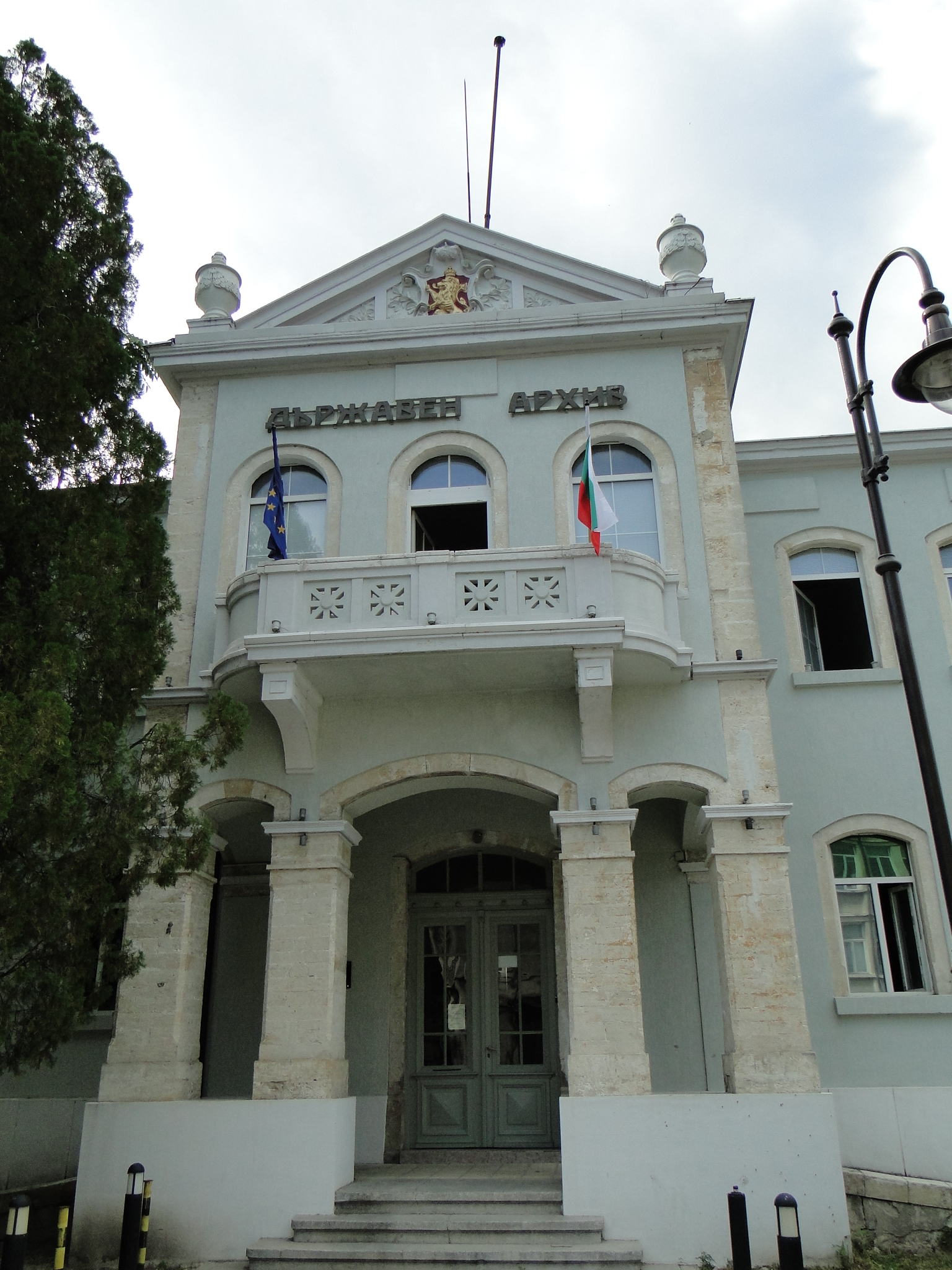 Варна